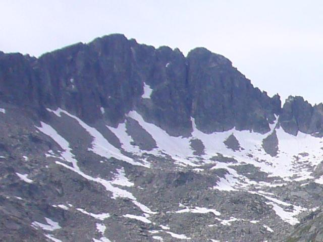 Tuc de Balaguera i Pic de la Tallada Llarga, vistos des del Port de Ribereta; Naut Aran, Vall d’Aran, Catalunya